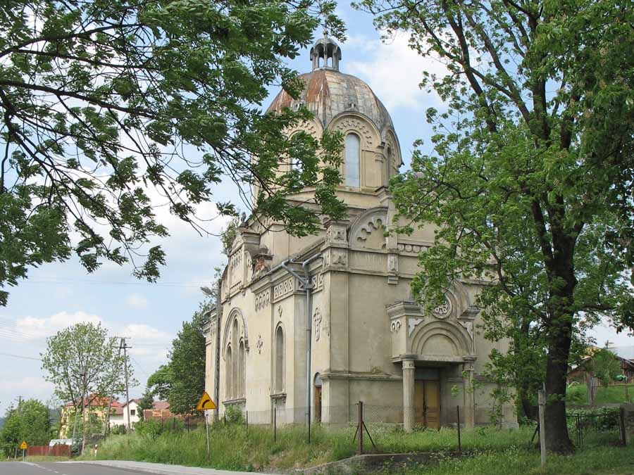 Krzywcza (Poland), Greek Catholic church